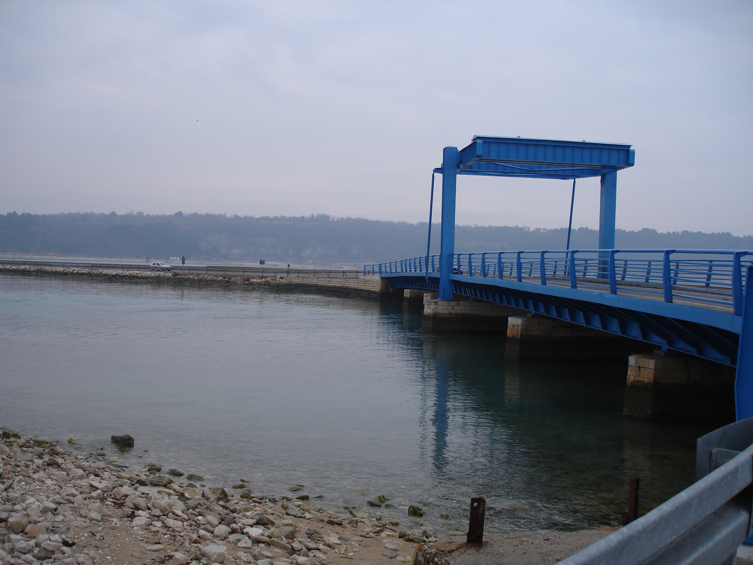 Most na ušću Mirne kod Antenala